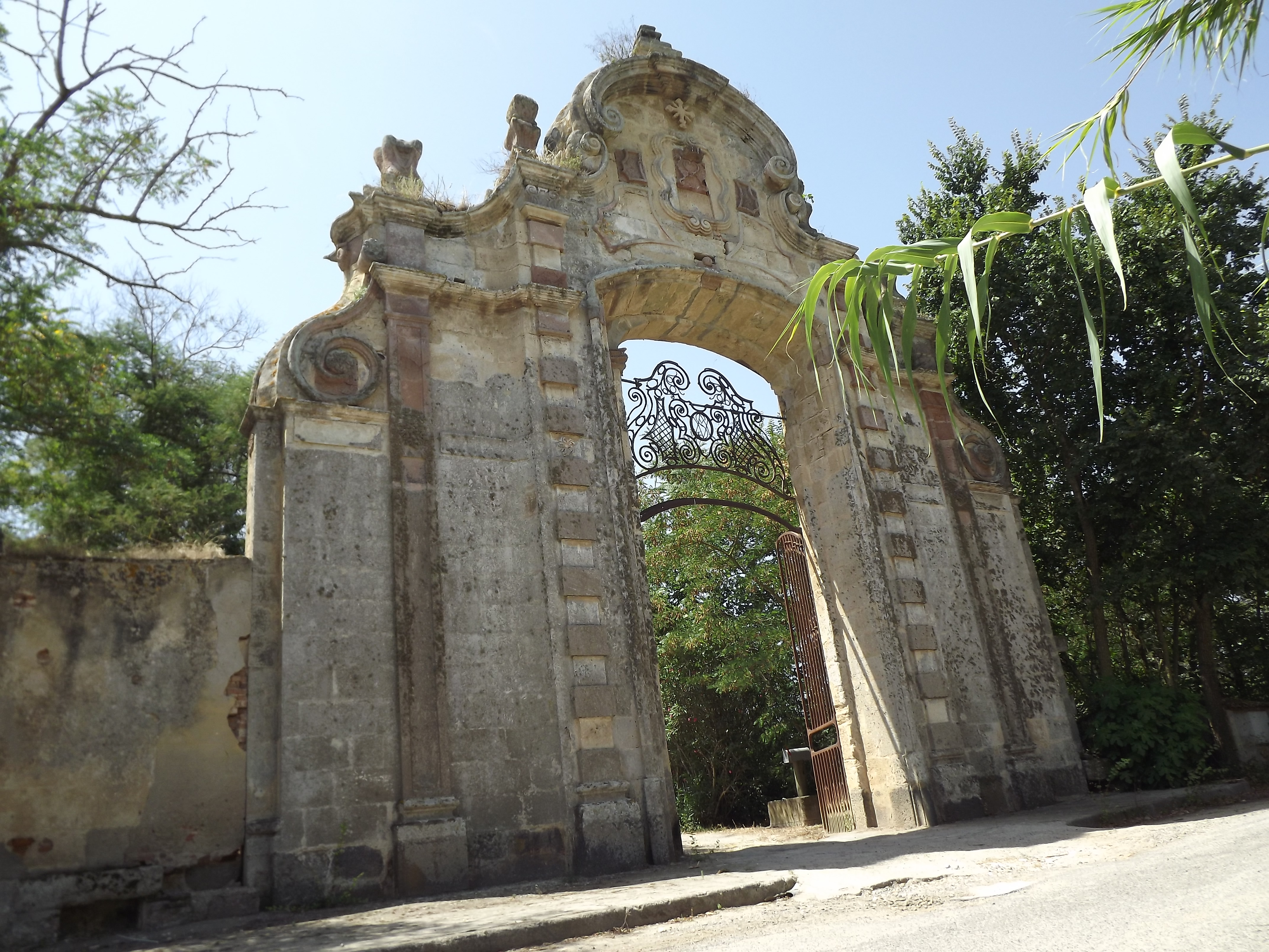 Il portale di Vito Soto presente a Donigala Fenughedu, è l'opera senza spazi interni di maggior spessore in Sardegna.